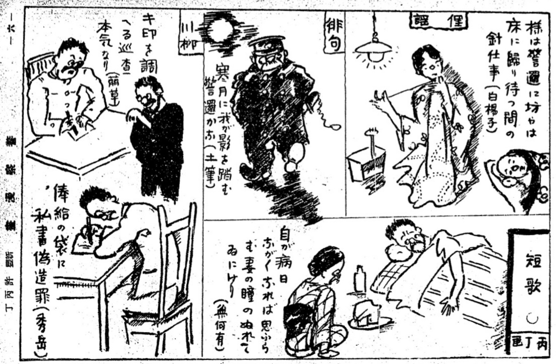 中文（台灣）: "警察漫畫", 臺灣警察時報, 1933-04-01 (author: 許丙丁)